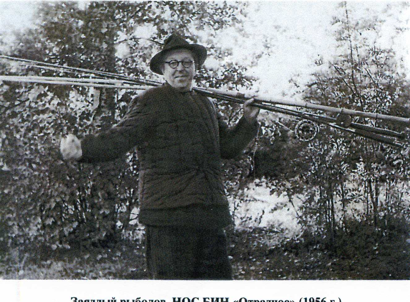 ННОС БИН "Отрадное" 1956г.